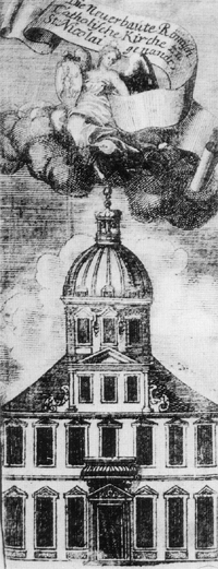 Die als Fachwerk-Kirche beschriebene Nicolaikirche in Braunschweig um 1714 (?)